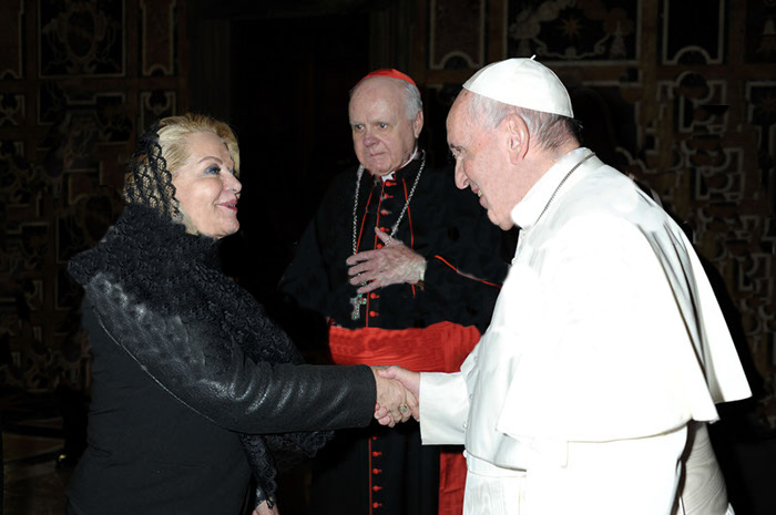 Dama Isis Penido com o Papa Francisco e o Grão Mestre da Ord